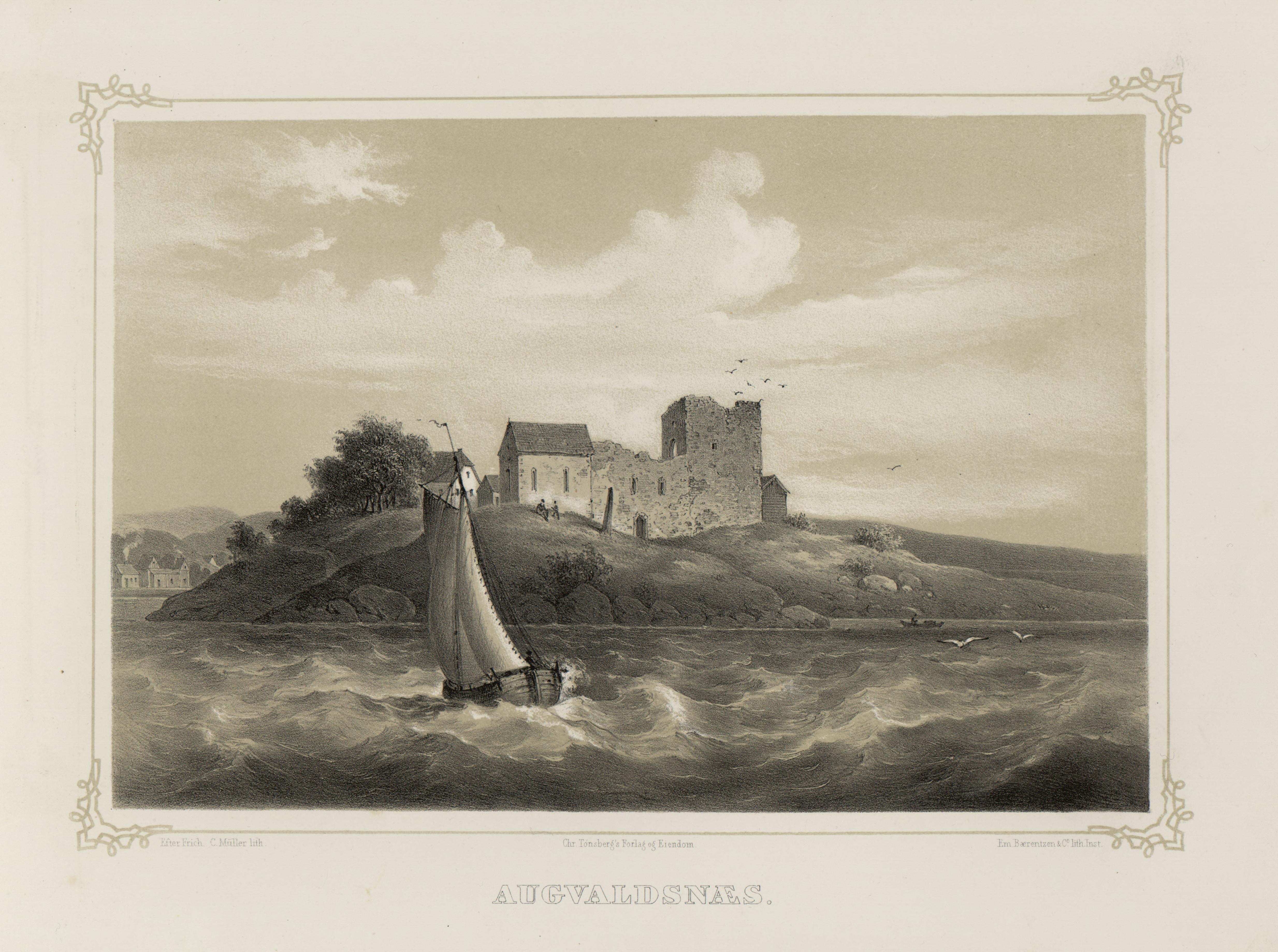 Illustrasjon hentet fra boken "Norge fremstillet i Tegninger" av Asbjørnsen, P.Chr. og utgitt av Chr. Tønsberg (no, 1848)